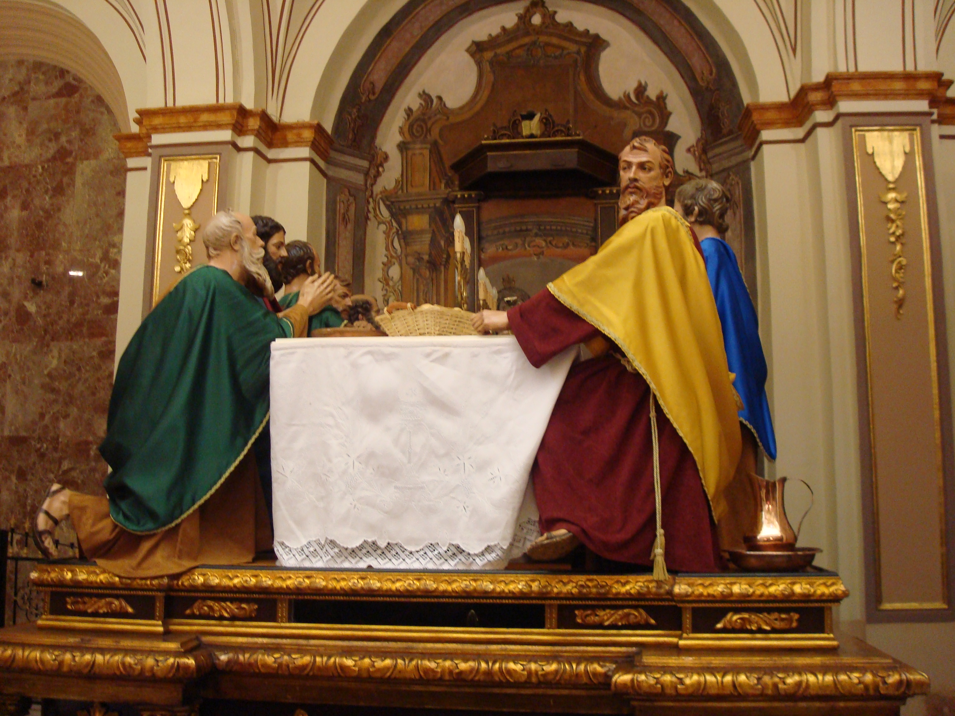 La última cena, obra de Nicolás Salzillo (Padre de Francisco Salzillo), Paso Morado, Semana Santa de Lorca